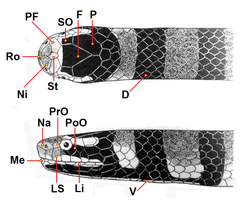 Tagged version of LaticaudaColubrinaSmith.jpg